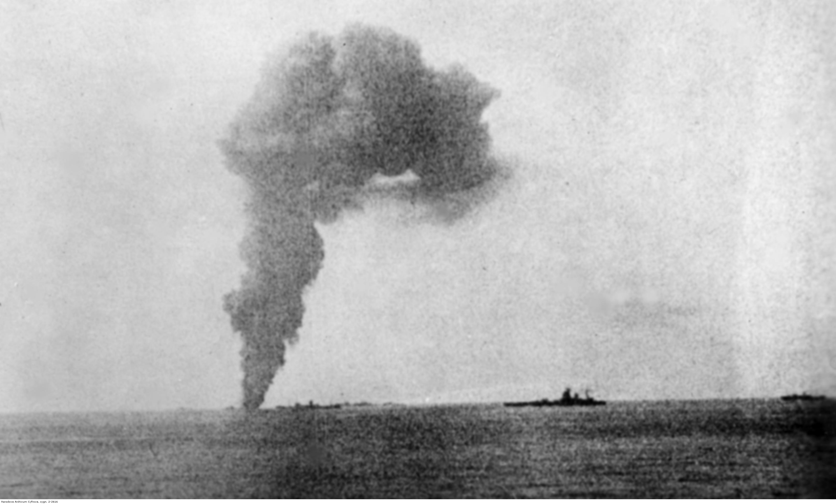 Chmura dymu nad Morzem Śródziemnym z trafionego niszczyciela. Data wskazuje na konwój na Maltę w ramach operacji Substance, kiedy utracono niszczyciel HMS "Fearless". Na pierwszym planie widoczny pancernik HMS "Nelson".